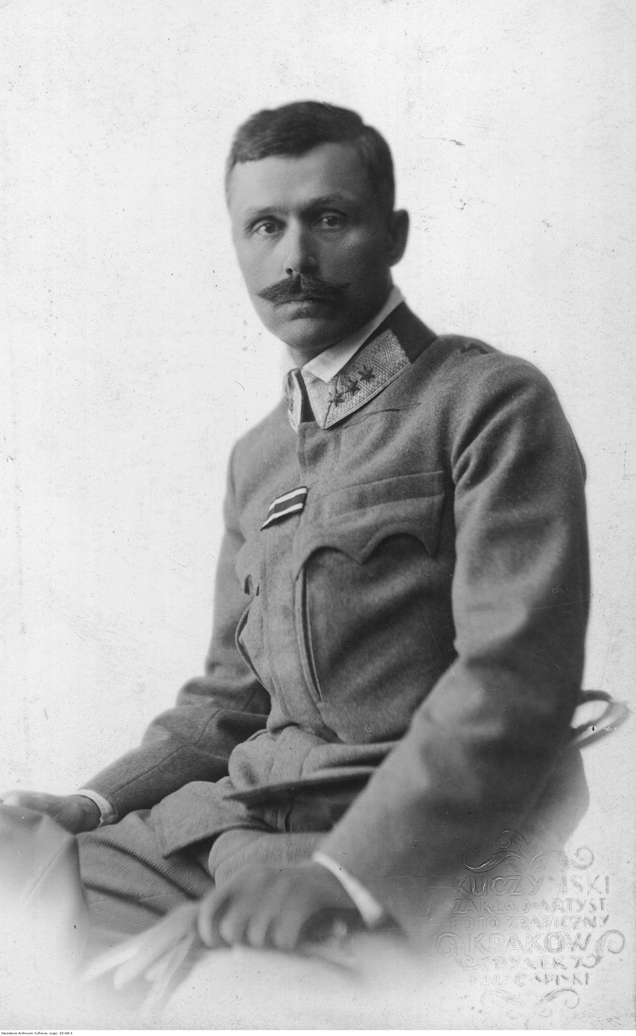 Bolesław Roja, pułkownik dowódca 4 pułku piechoty Legionów - fotografia portretowa.